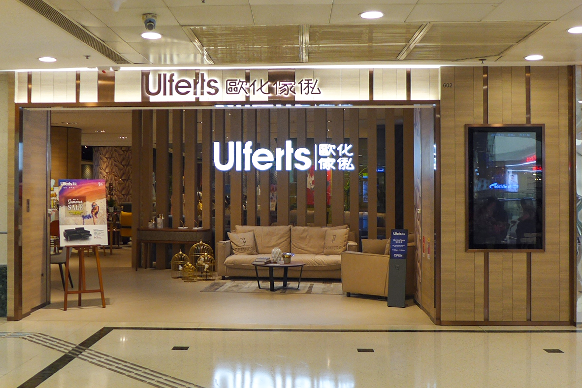 Telford Plaza Ulferts